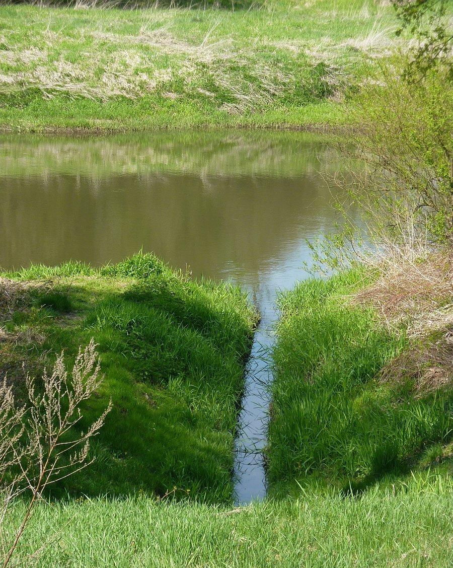 Z cyklu "z biegiem Rogożówki" zdjęcie nr 8: To już koniec biegu Rogożówki: jej ujście do rzeki Bystrzyca. Fotografia wykonana z wału przeciwpowodziowego.